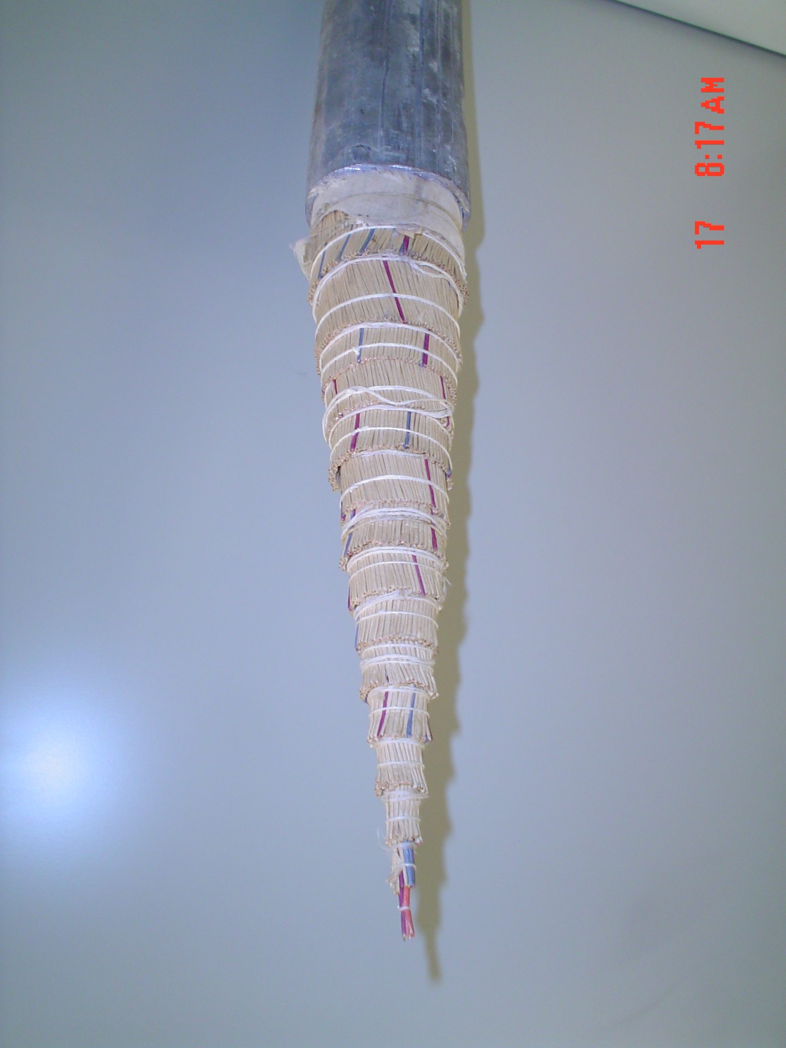 Loka_entira_parotorda_kablo kun plumba ŝelo, tola kuseno, papera dratizolaĵo,624x4 konduktiloj